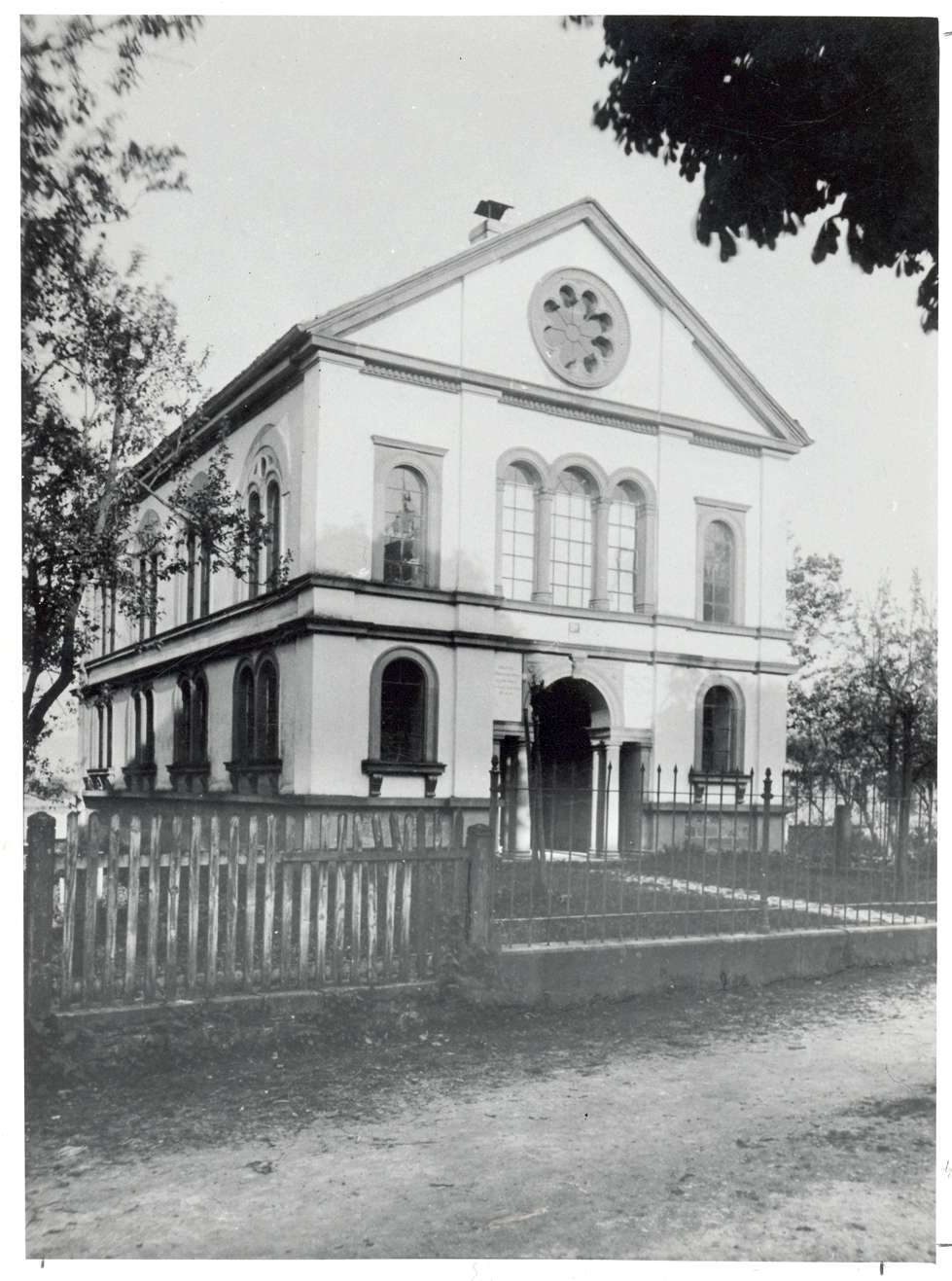 Synagoge (Ettenheim) Nutzungsbedingungen ausdrücklich auch für Wikipedia (siehe: [1]